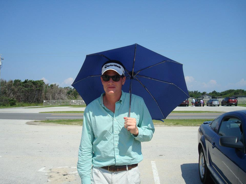 Homme portant une ombrelle